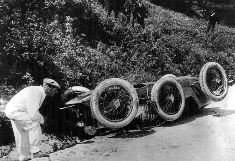 La Delage di Giulio Masetti dopo l'incidente alla targa Florio 1926